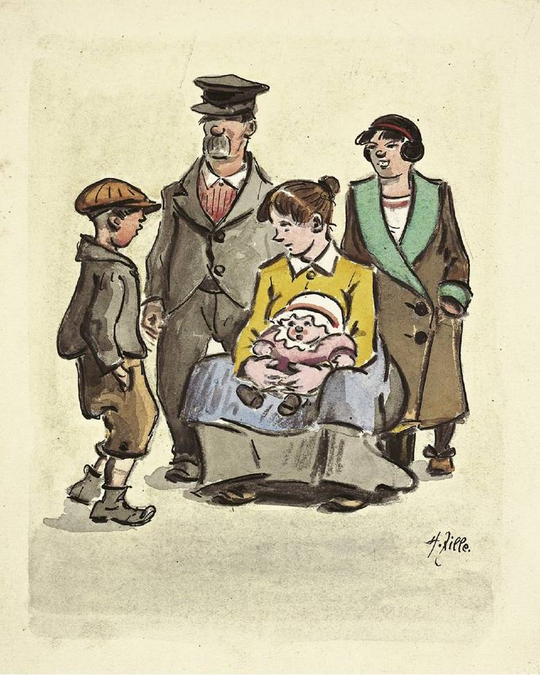 Heinrich Zille: „Der Familienrat“ Tuschfeder über Kreide, aquarelliert, auf leichtem Karton. 17,7 x 13,7 cm (22,9 x 16,1 cm).